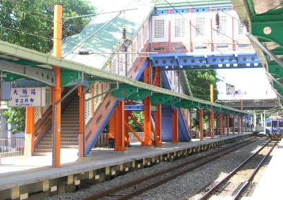 臺灣臺南市永康區臺鐵縱貫線大橋車站。